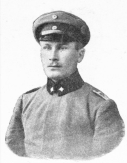 Description